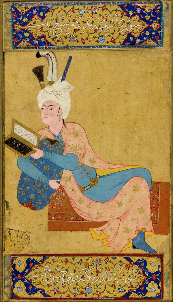 Отдыхающий принц.Припис. Ага Миреку.